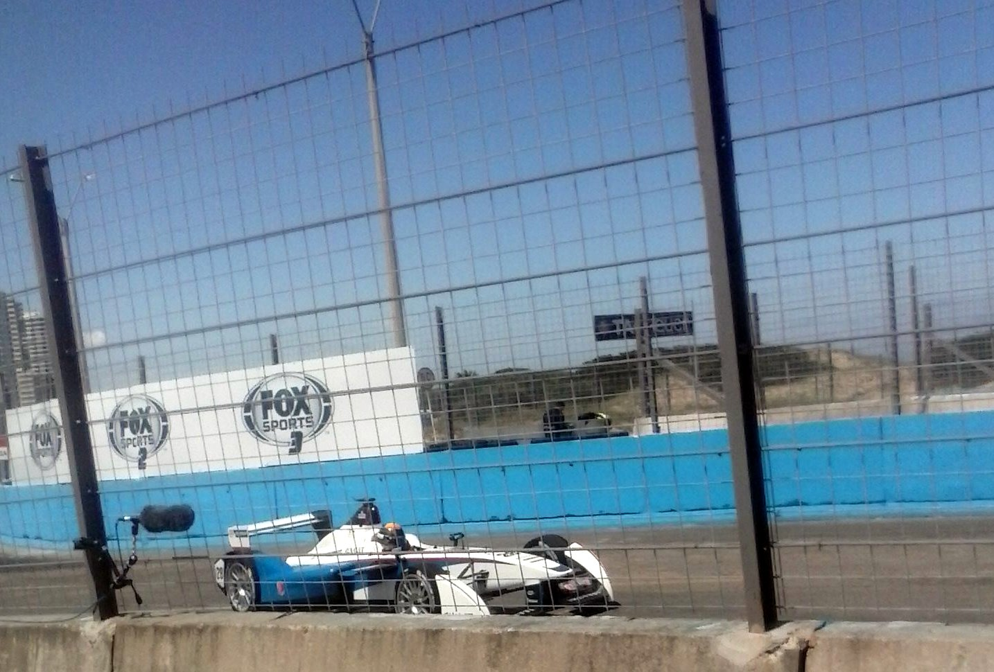 Jean Eric Vergne en el ePrix de Punta del Este del 2014, fecha valida por la Formula E.